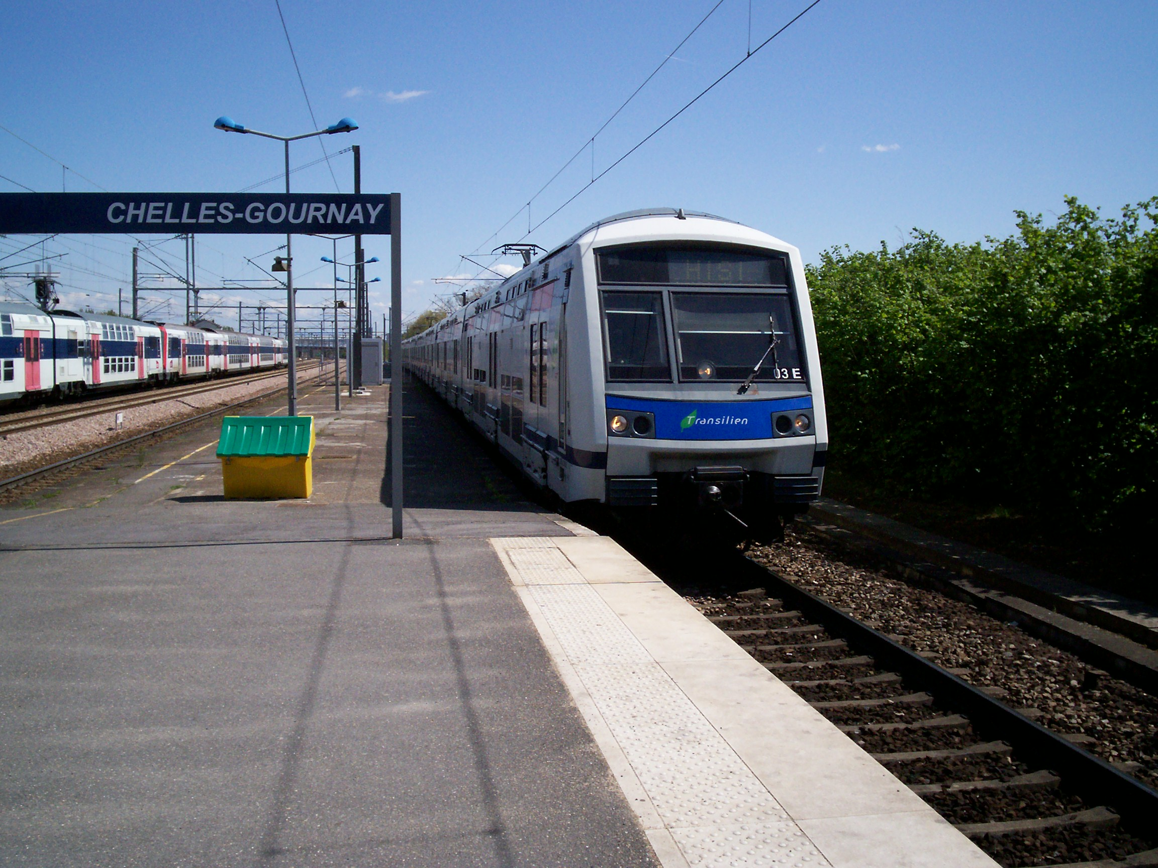 Rame Z22500 à Chelles (code HISI)